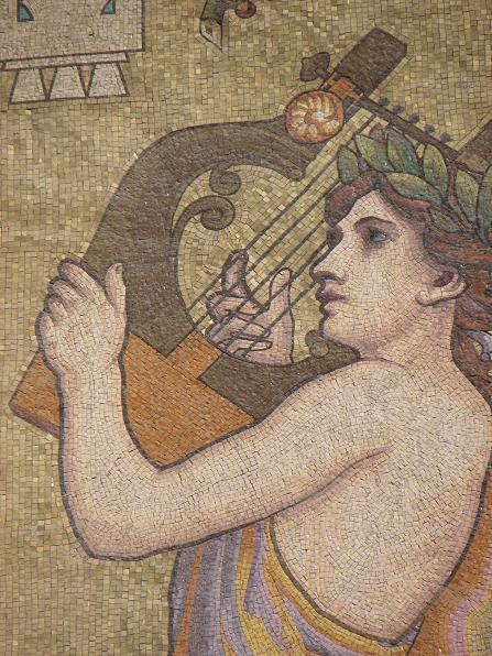 Lyon : Mosaïque de la muse Euterpe de la salle Rameau